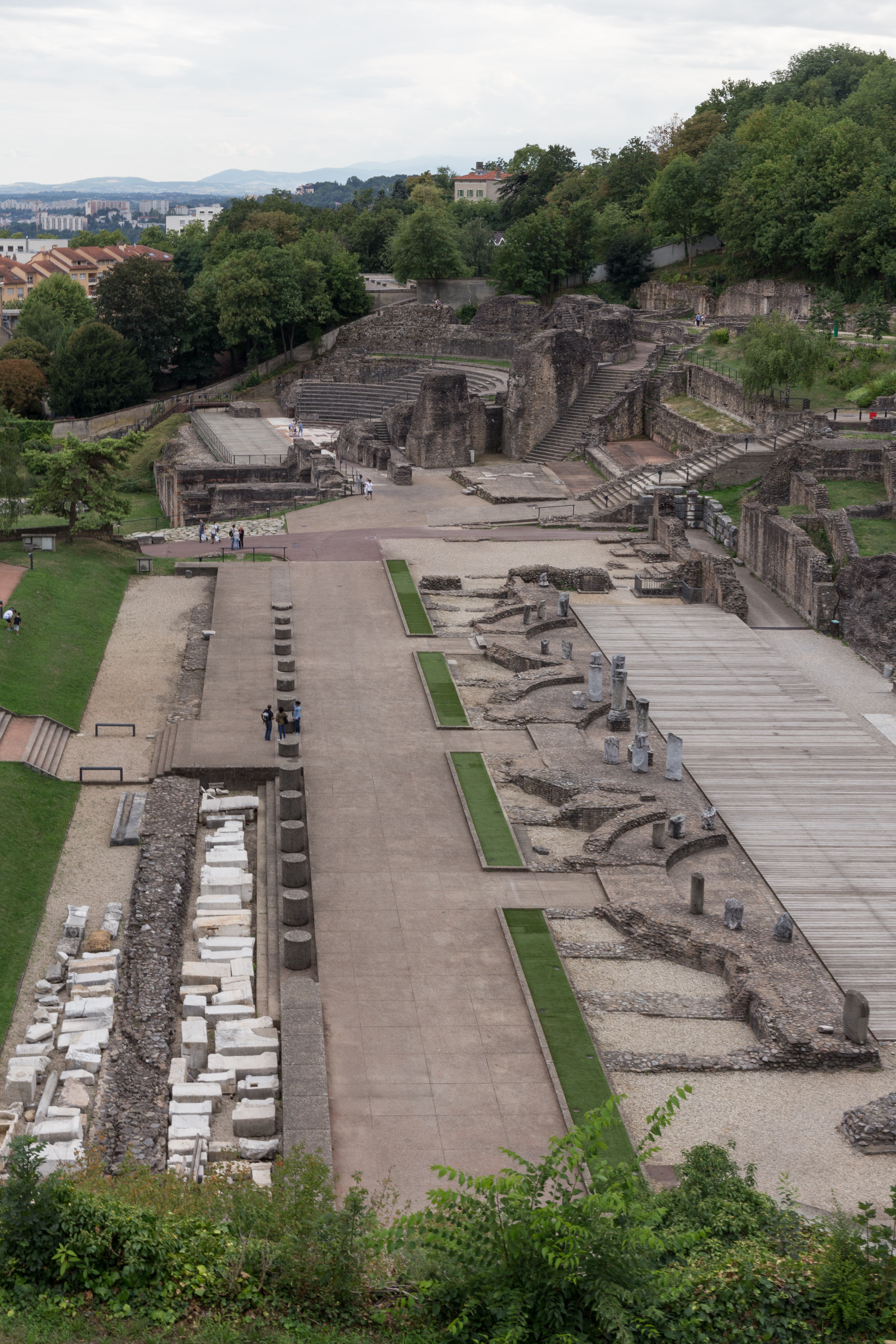 Théâtre antique de Lyon dans le 5e arrondissement de Lyon : la scène. .